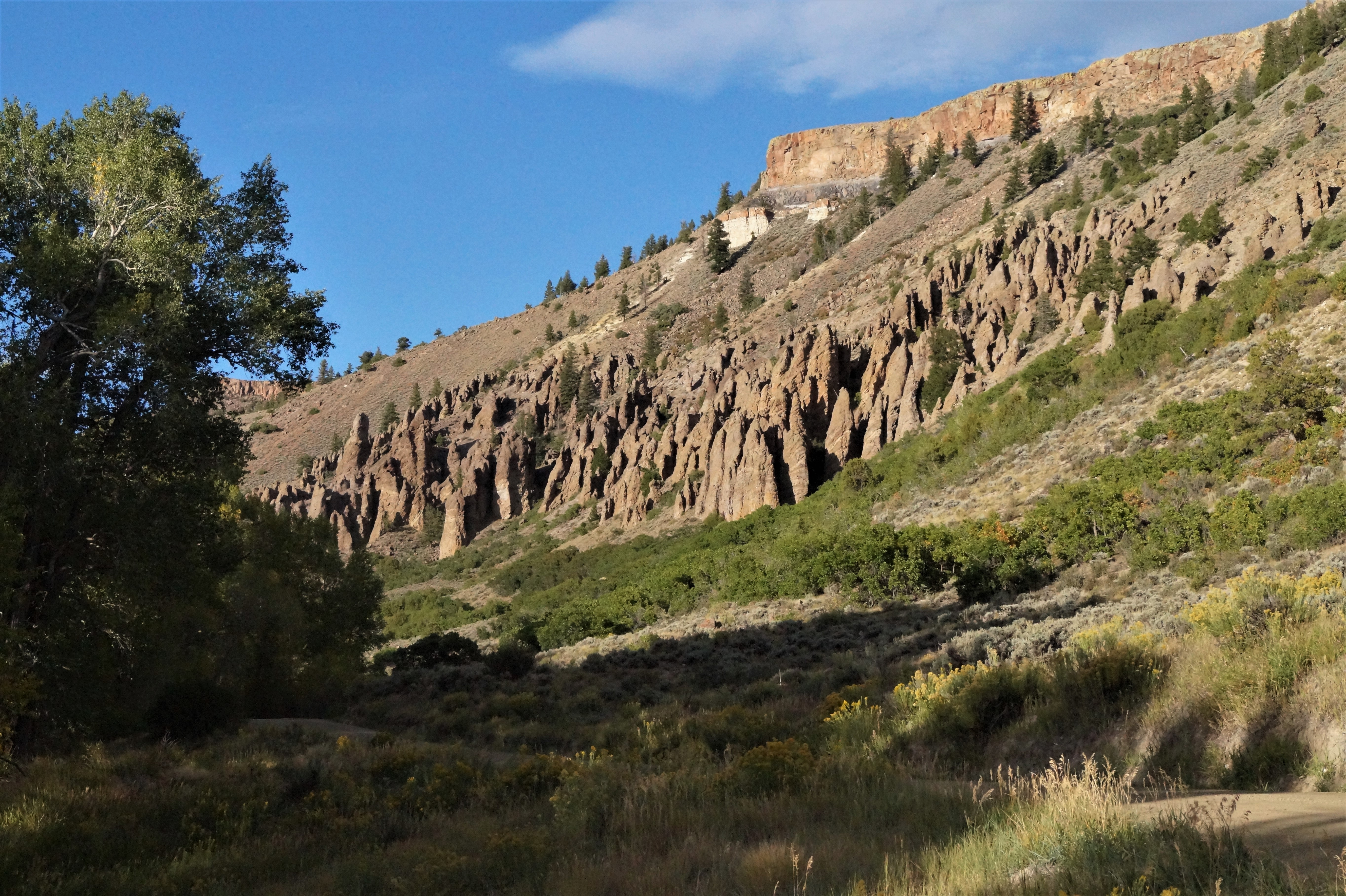 Hoodoos in der Nähe des Blue Mesa Reservoirs bei Gunnison.